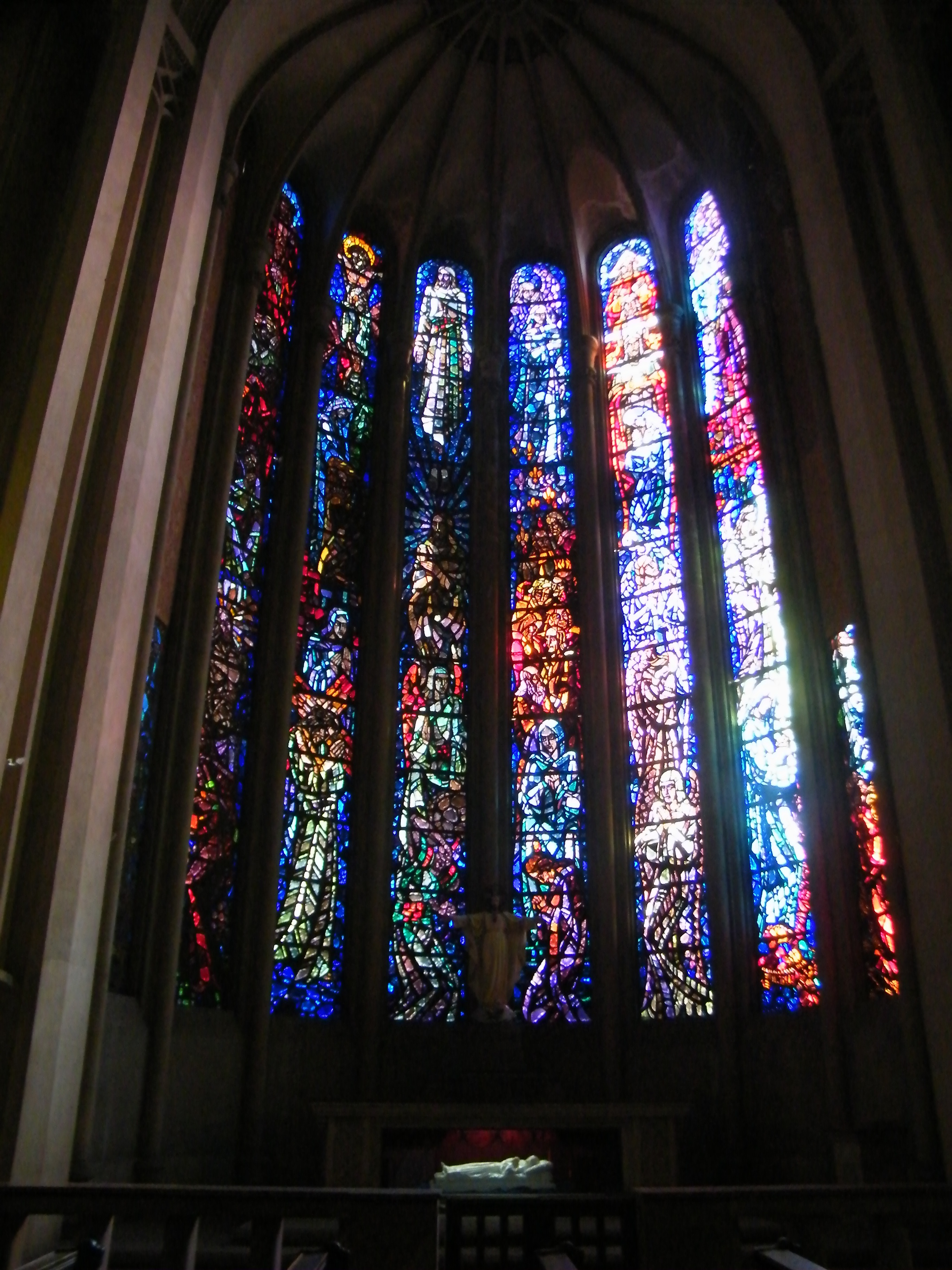 Imágenes Santuario Lourdes(Chile), Basílica.